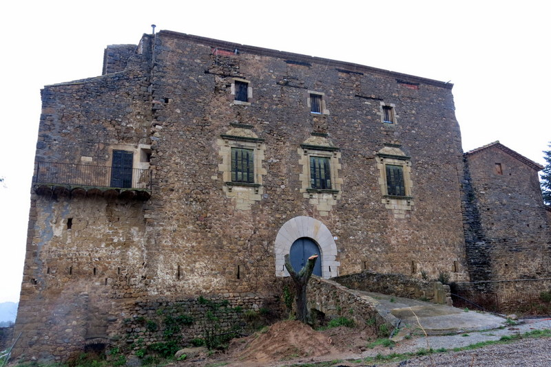 castell de Vilarig_Alt Empordà - Catalunya